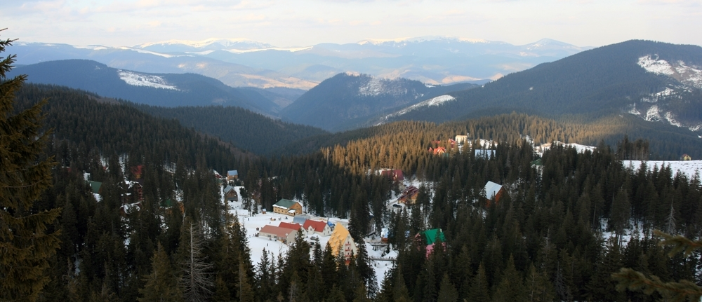 Вид на курортный поселок Драгобрат с горы Жандарм